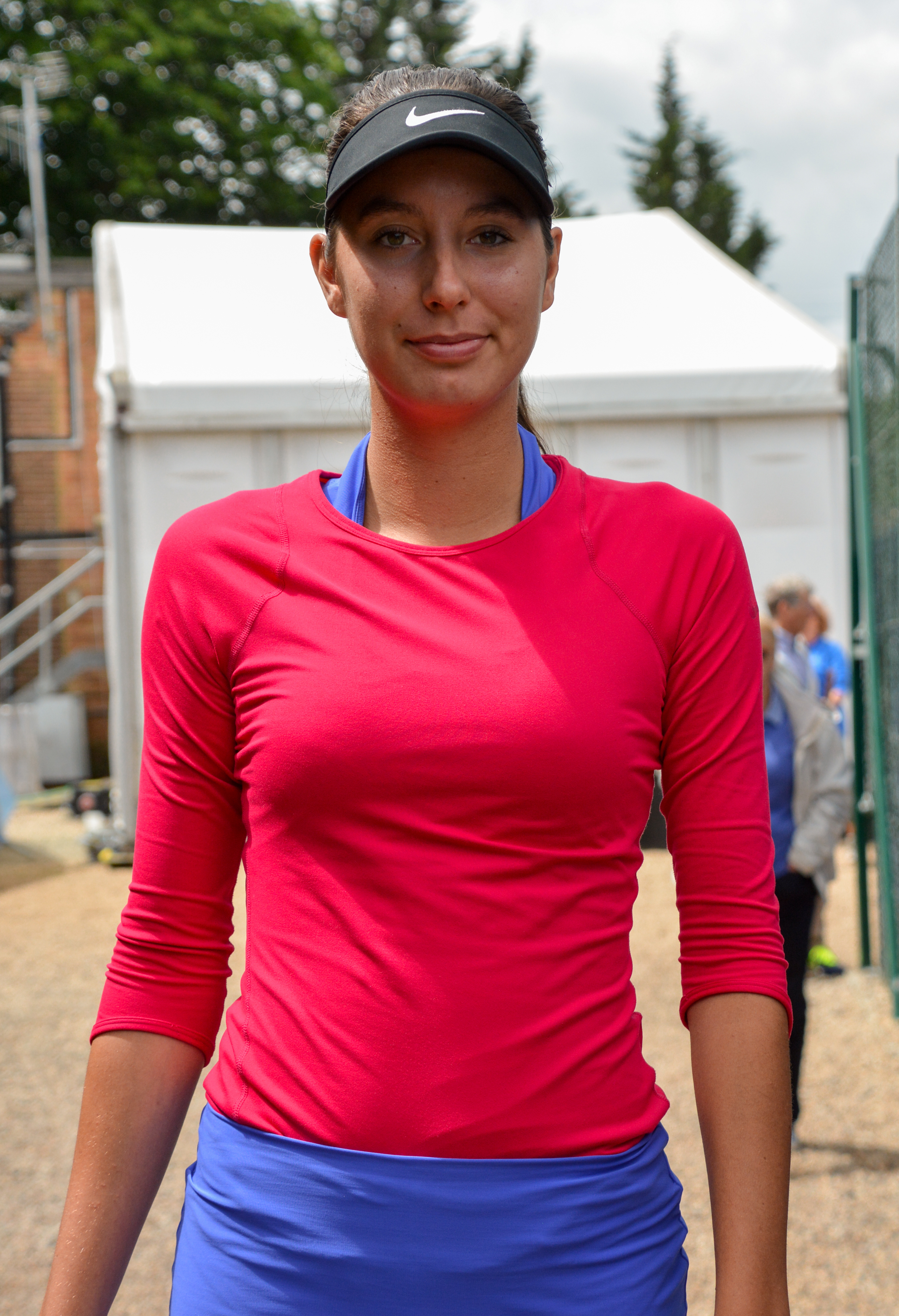 Surbiton, June 2017.